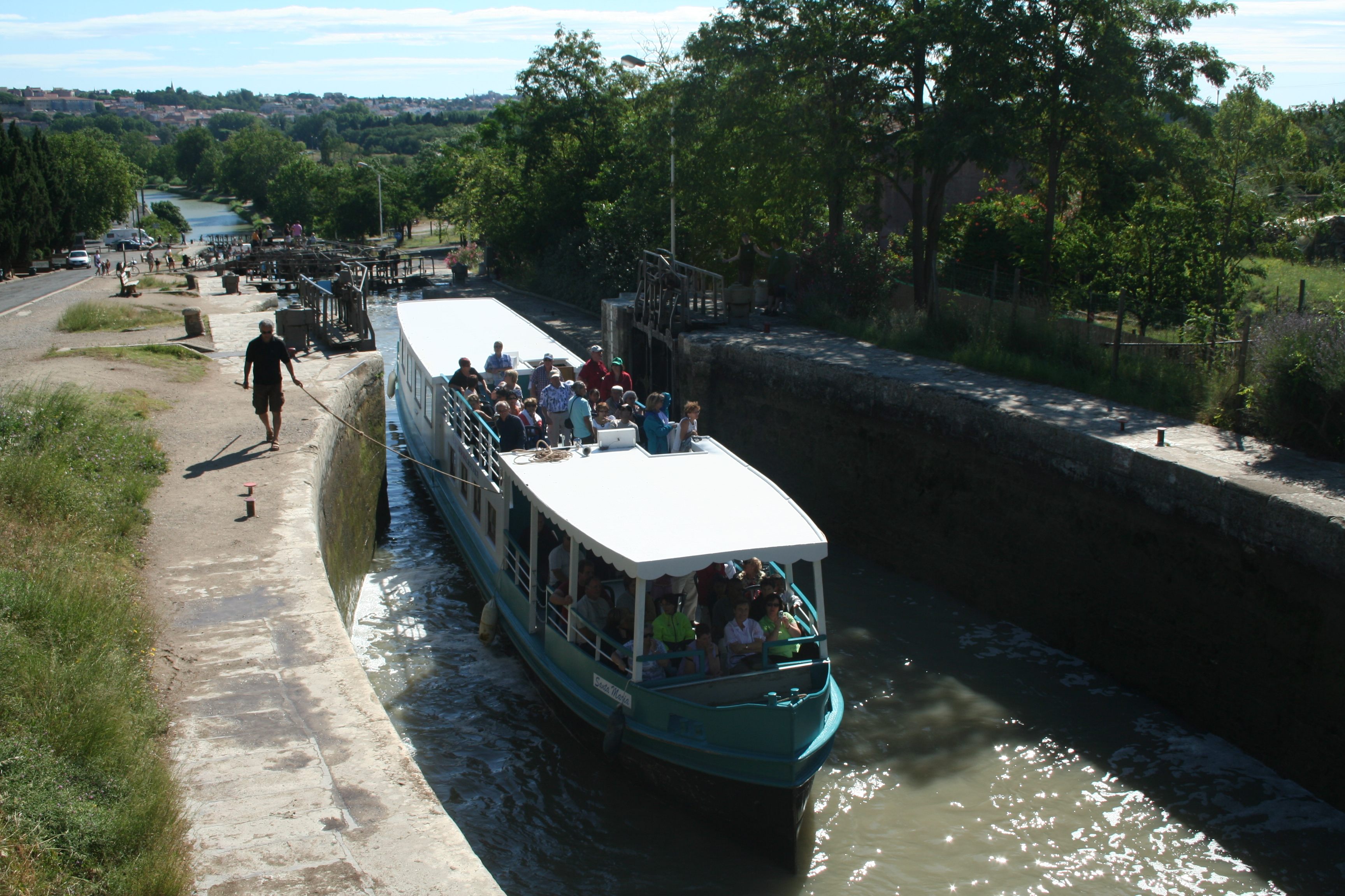 Béziers (Hérault) - bâteau dans une des écluses de Fonseranes.